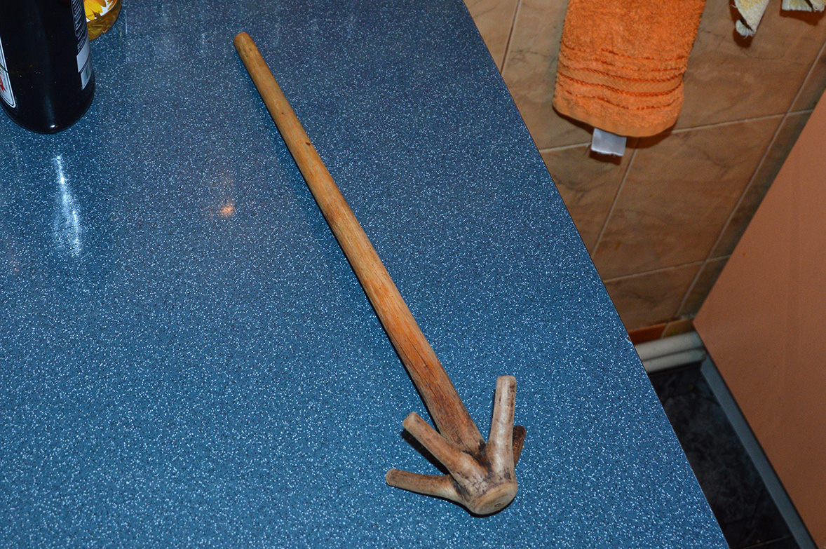 Джуруляк от Ботевград, България. Изработен е от стъблото на елха, като са използвани естествените разклонения на стъблото.